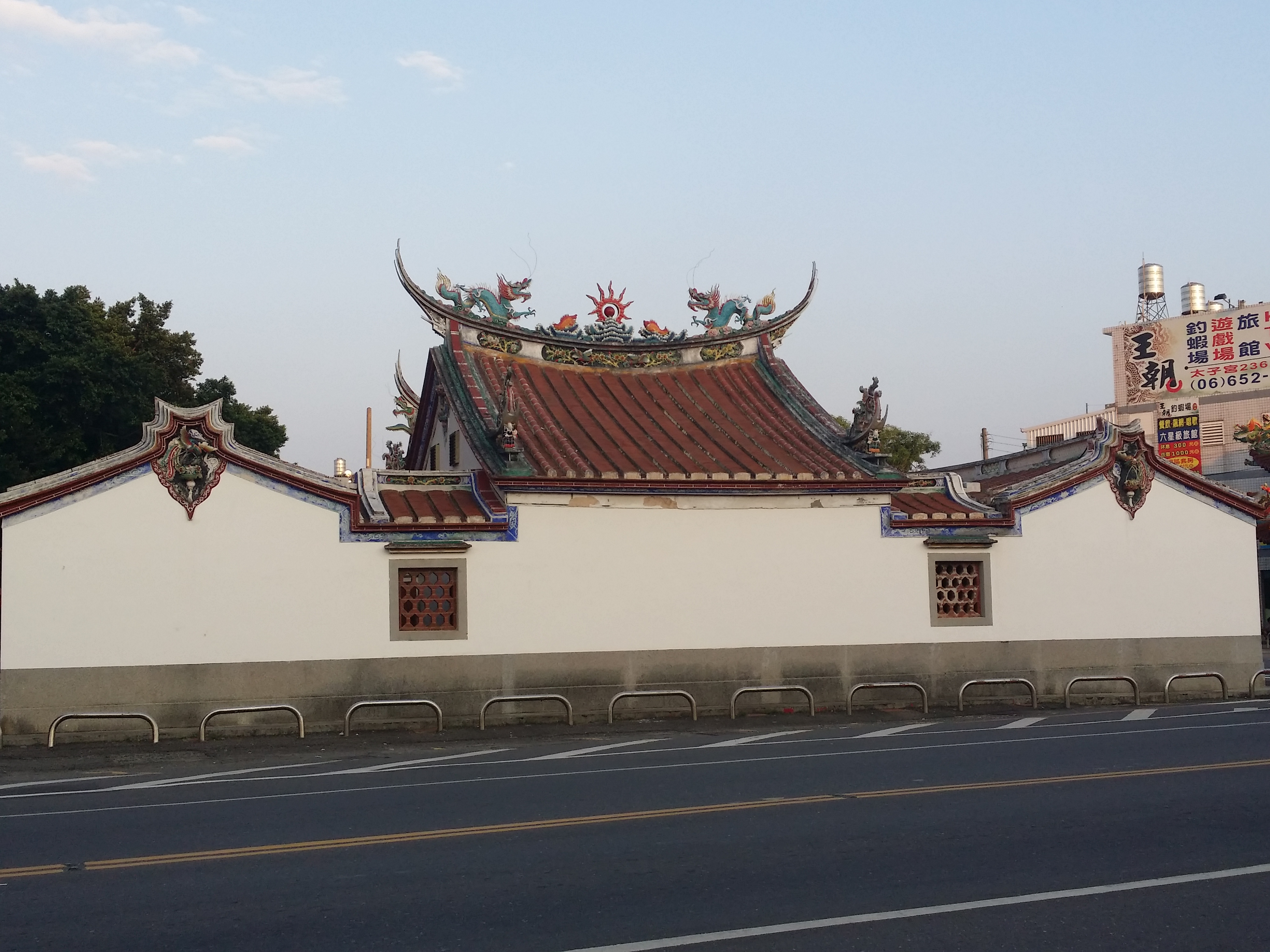 新營太子宮對面也可看見古色古香的建築（新營太子宮舊廟）。